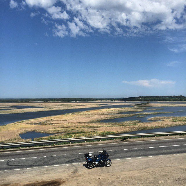 Река Свияга: Апастовский район, Татарстан This image is related to the protected area of Russia number 1610028